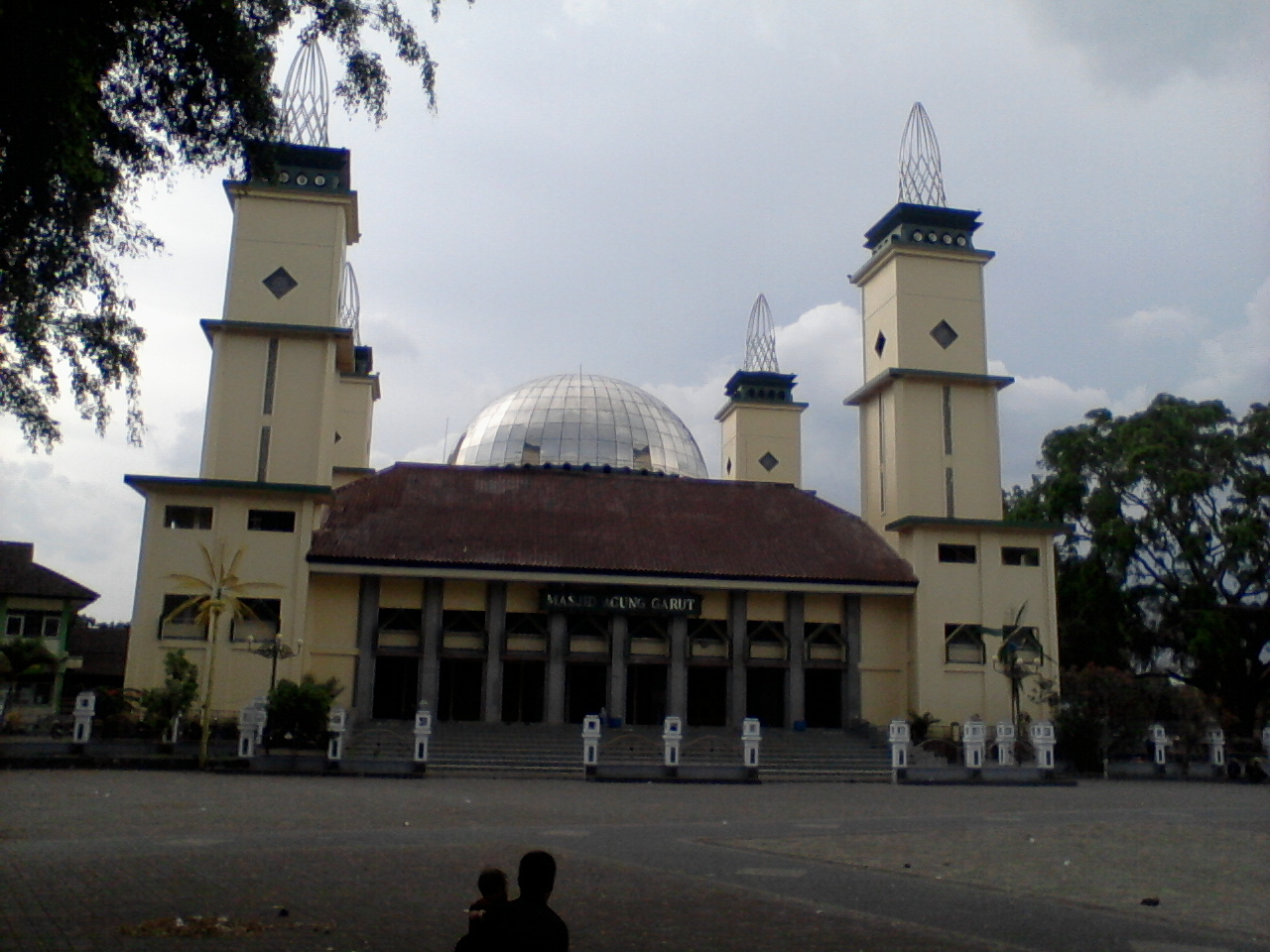 Mesjid agung Garut yang berada di wilayah alun-alun Garut